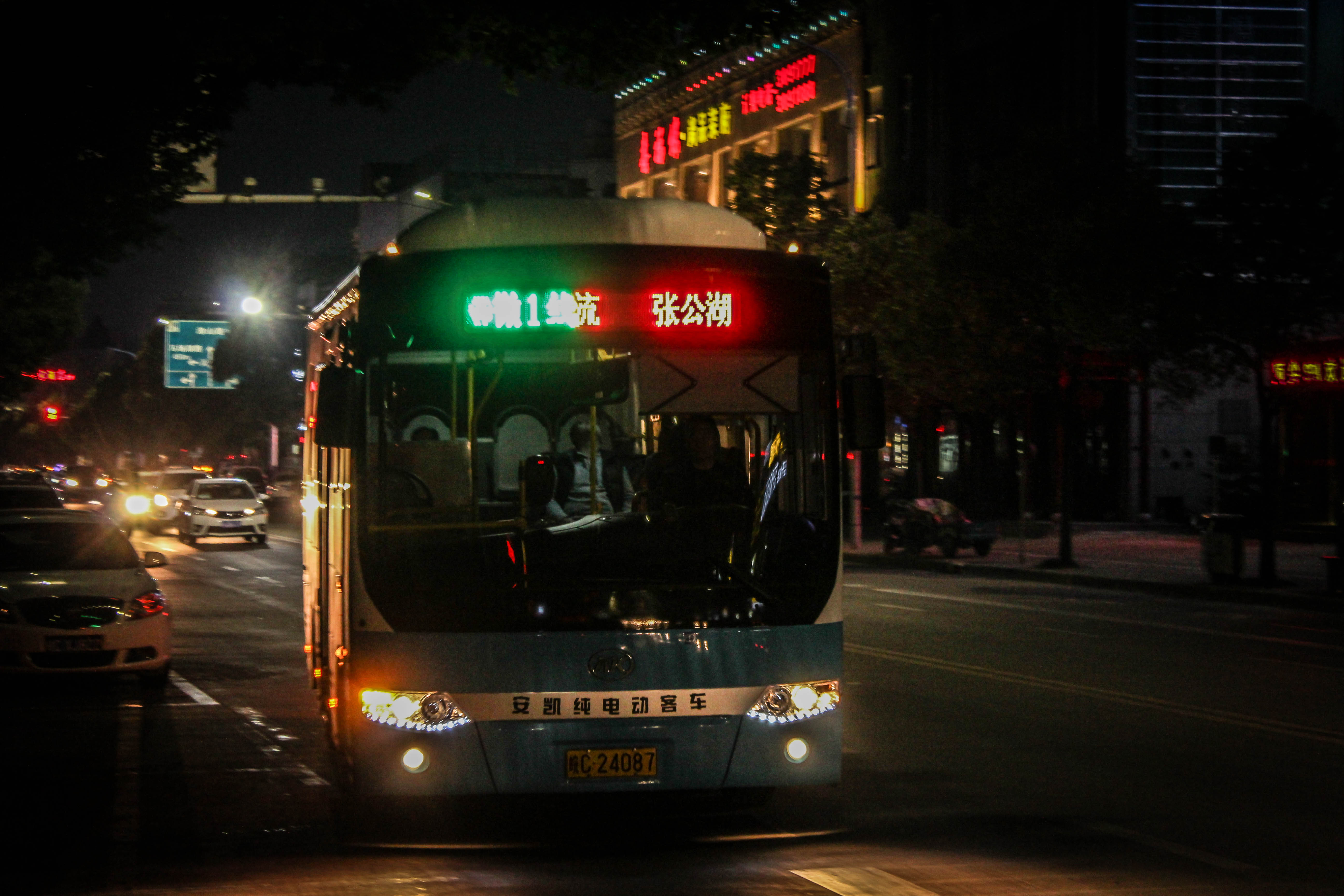 中文（中国大陆）: Bengbu Bus Micro No.1 Line